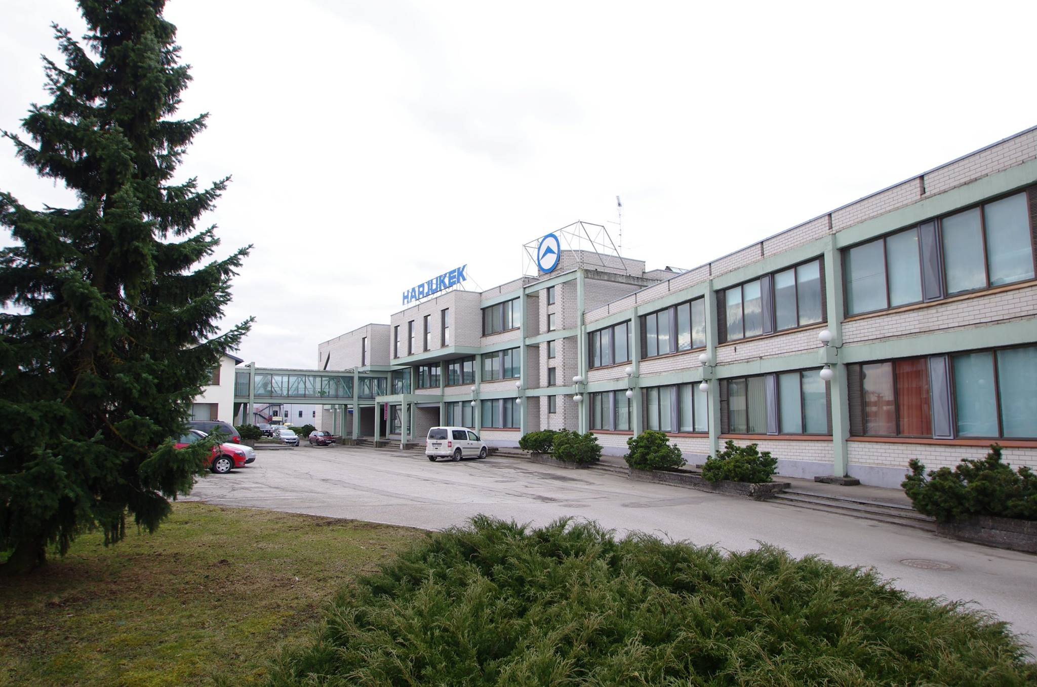 Harju KEKi peahoone